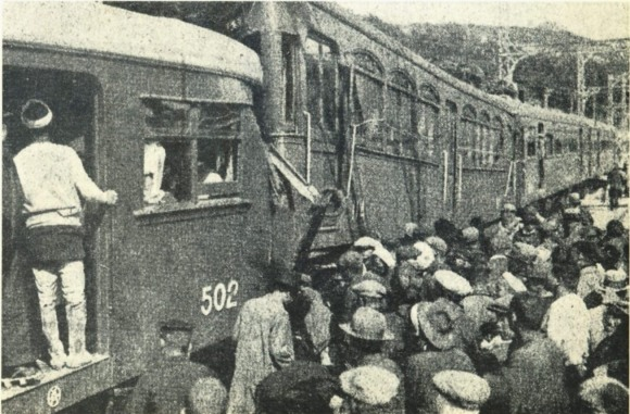 1929年4月14日、大鉄(大阪鉄道、現・近鉄南大阪線)上ノ太子駅での三重衝突事故。アサヒグラフからの転載。 2日後の4月16日には、京都電燈(現・京福)北野線で花見客を乗せた電車が妙心寺～御室のカーブ(御室小学校裏)で正面衝突し、死傷者42名を出した。「事故の鉄道史」P85で事故の場所と日付のみが触れられている。